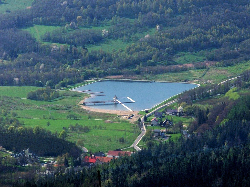 Zalew w Starej Morawie widziany z Suszycy (województwo dolnośląskie)